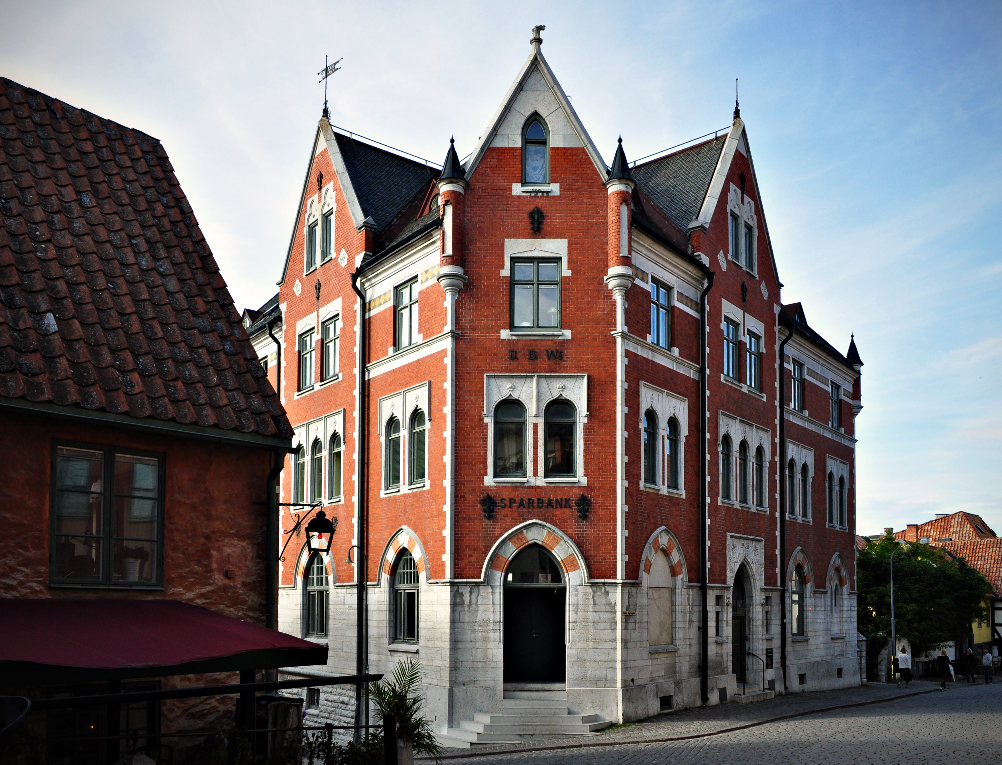 Bankhus uppfört 1901-1903. Arkitekter: Nils Börring, Ullrich & Hallqvist Byggherre: Sällskapet DBW:s (De Badande Wännerna) Sparbank.